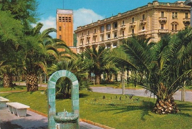 lungomare di salerno nella seconda metà del 900